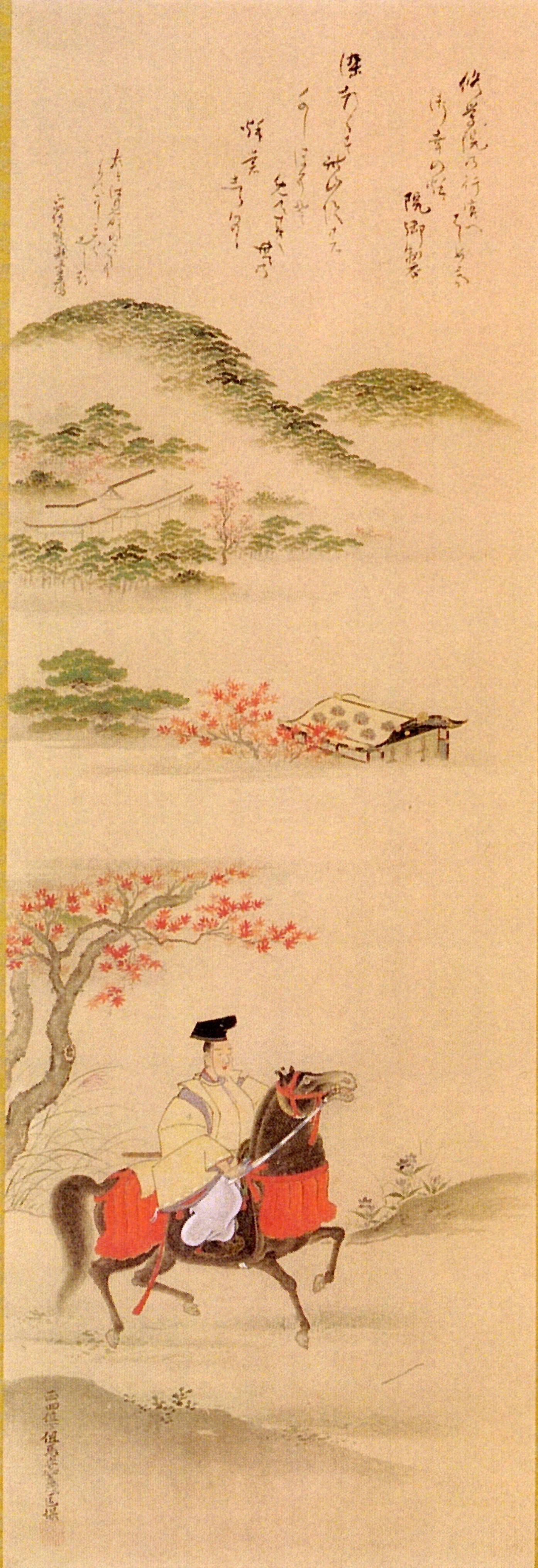 内藤信敦の肖像。